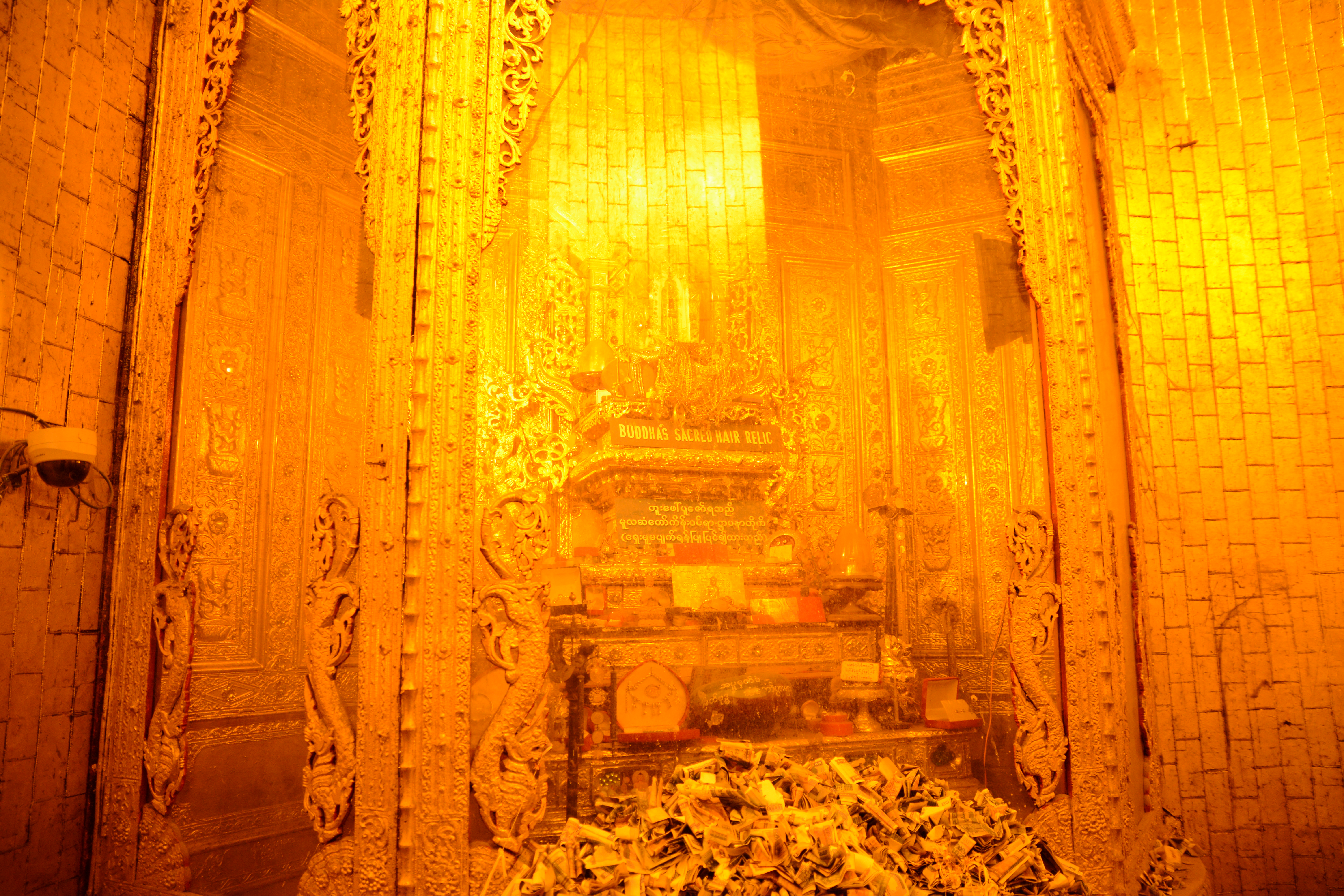 Botahtaung Pagoda